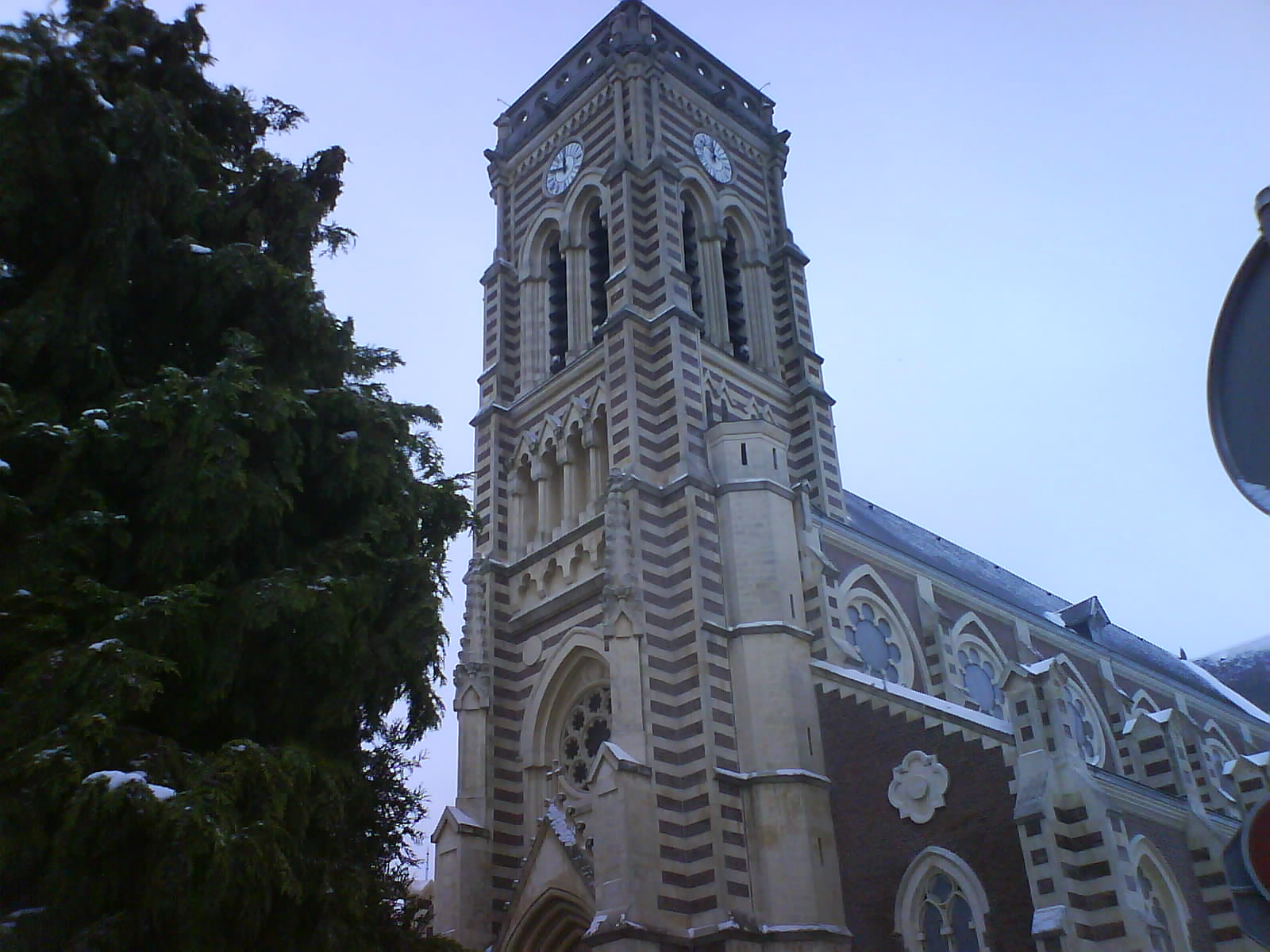 Eglise St.Maclou, Haubourdin, Décembre 2010